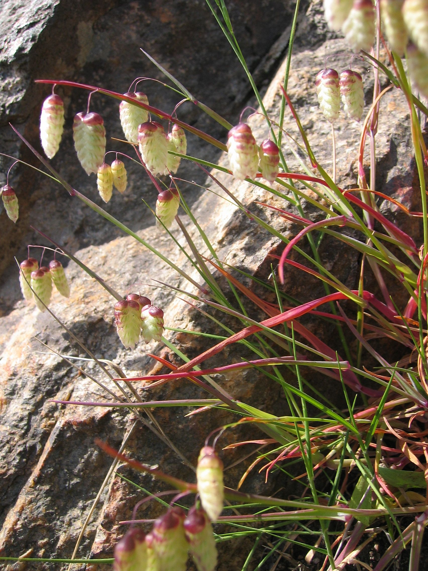 Briza maxima Calvi, Corse, France